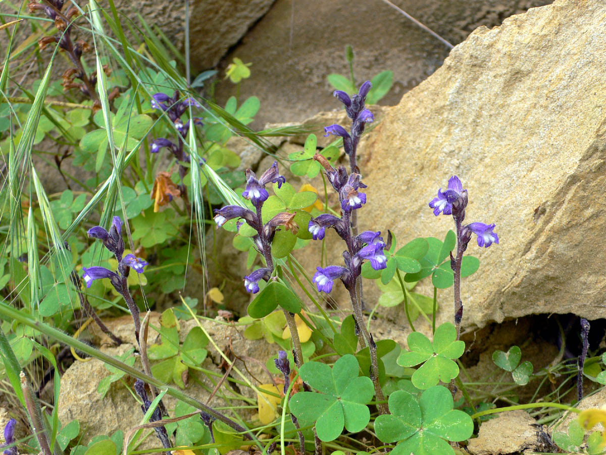 orobanche mutelii en Galifa. Parque natural de la Sierra de la Muela. Cartagena (Spain)